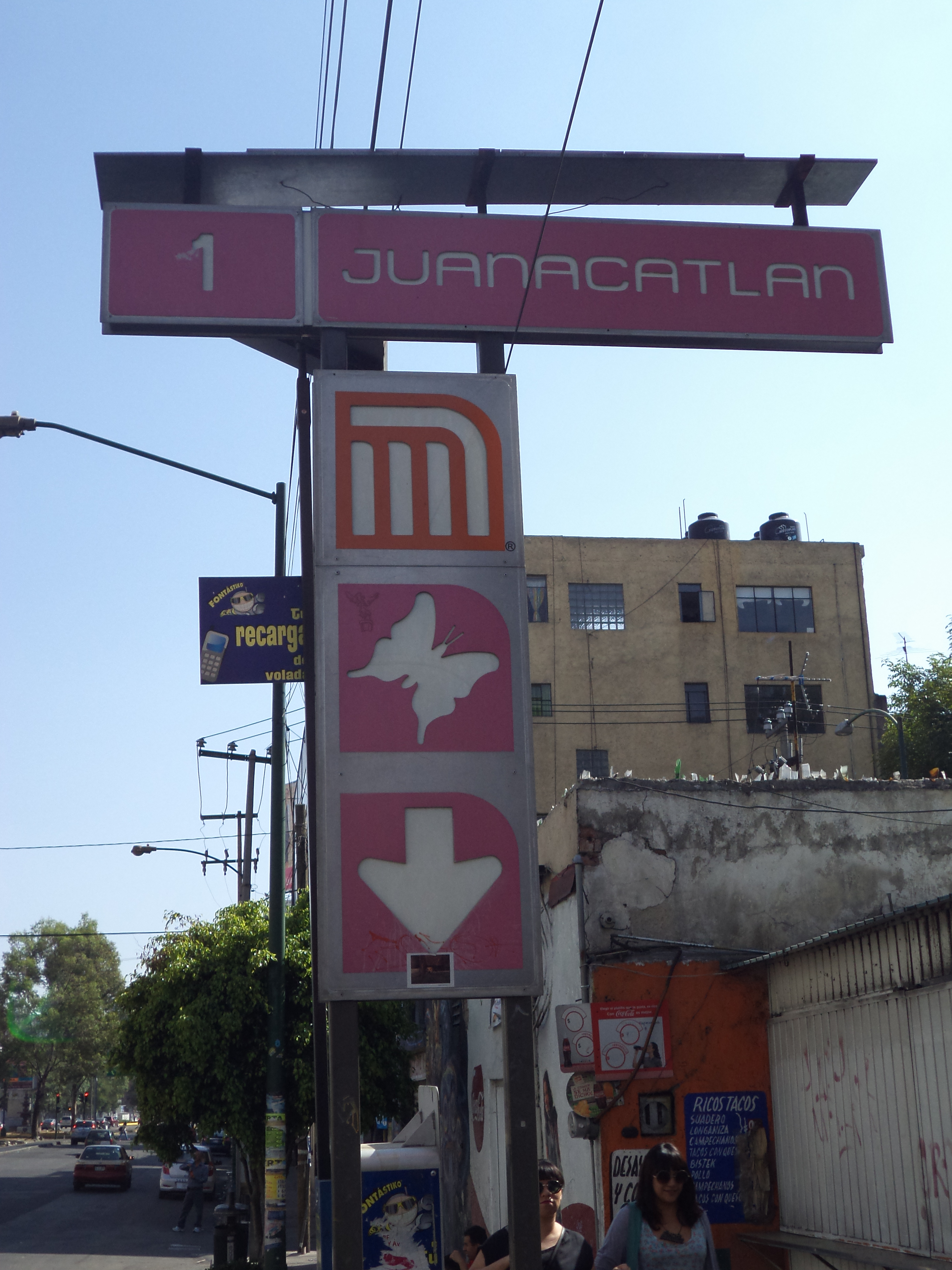 Estela Metro Juanacatlan